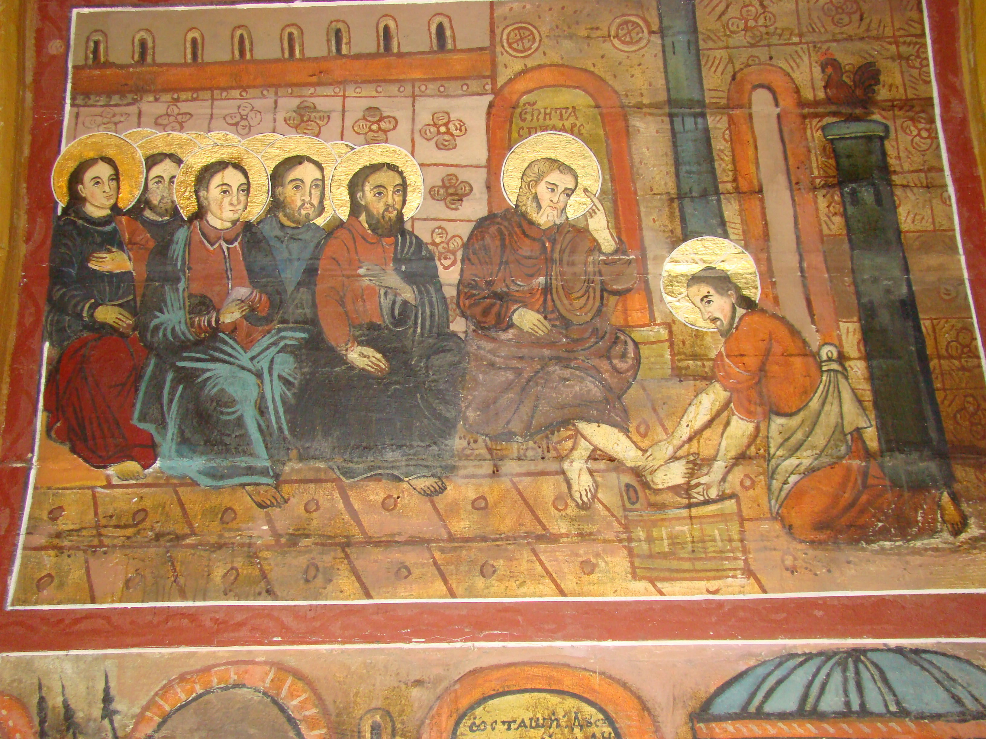 Biserica de lemn „Sfinții Arhangheli” din Năsal